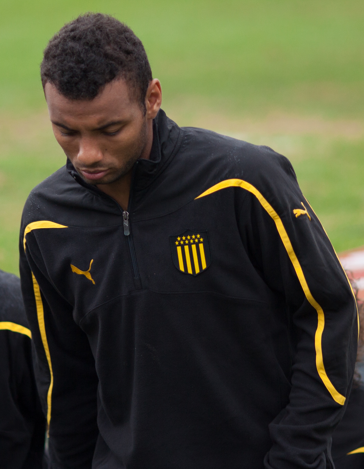 João Pedro playing for Penarol.